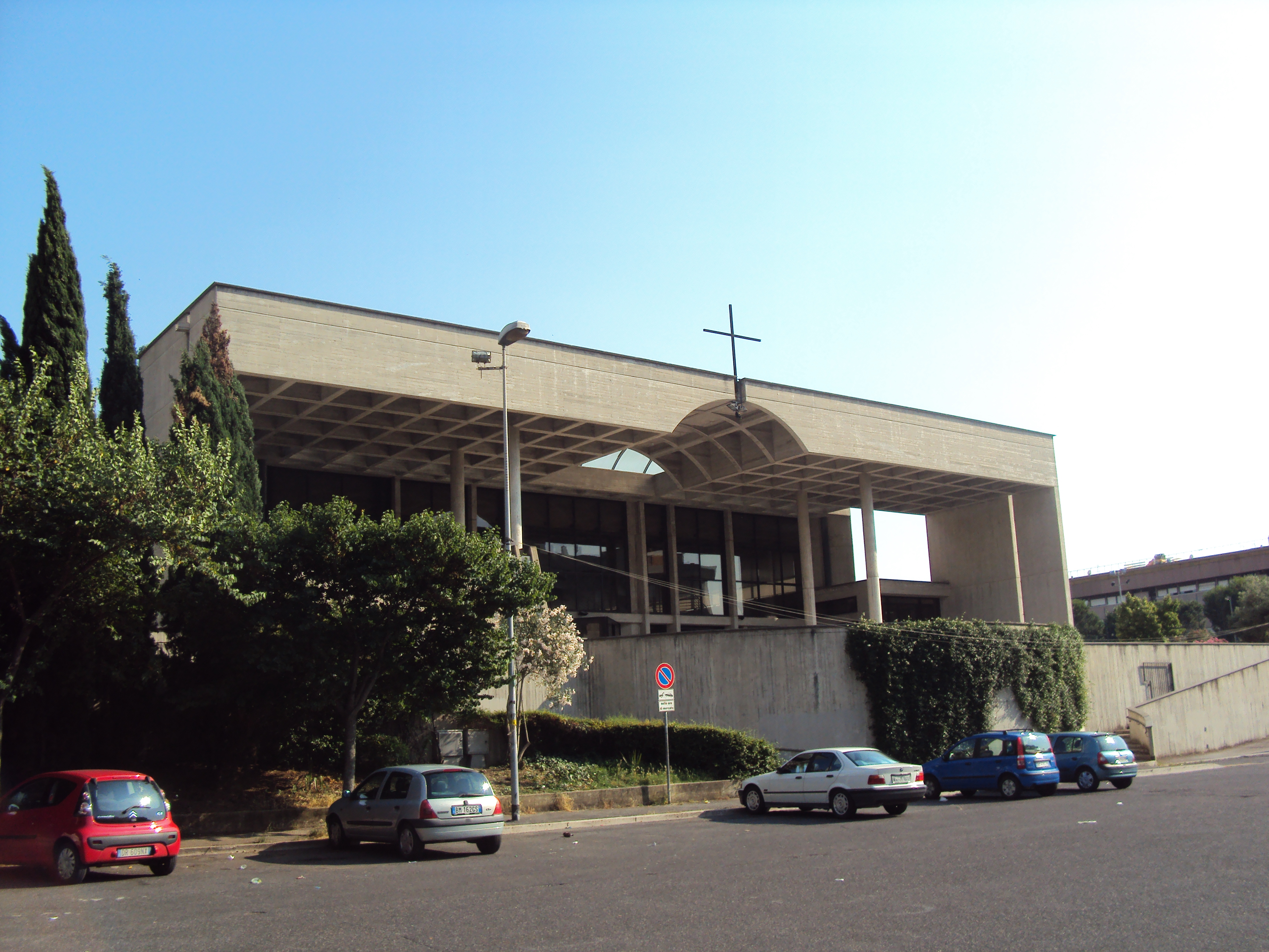 Chiesa Sant'Ugo